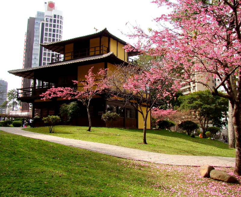 Florada das cerejeiras-do-japão na Praça do Japão em Curitiba, PR, Sul do Brasil.